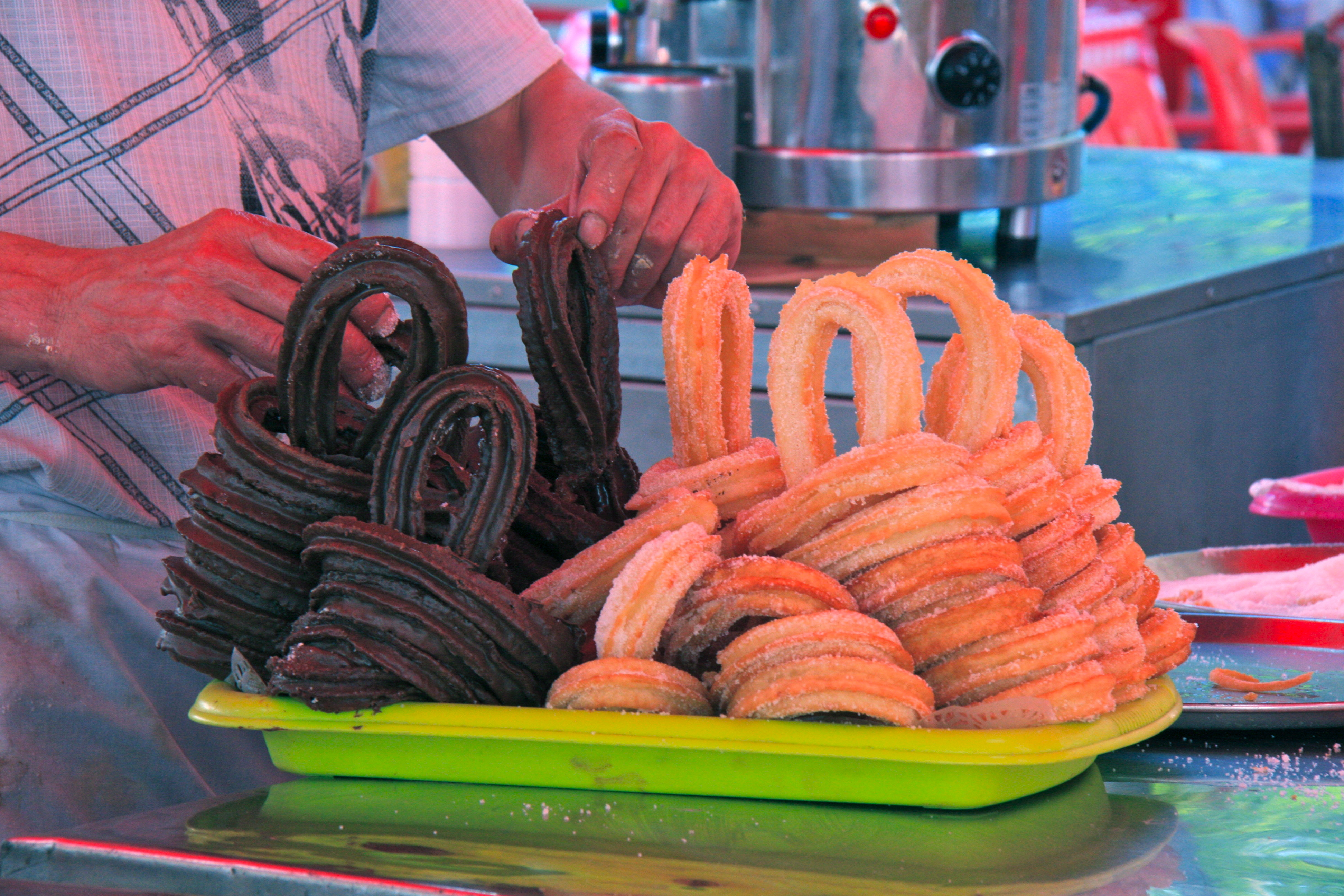 Colocación churros ...